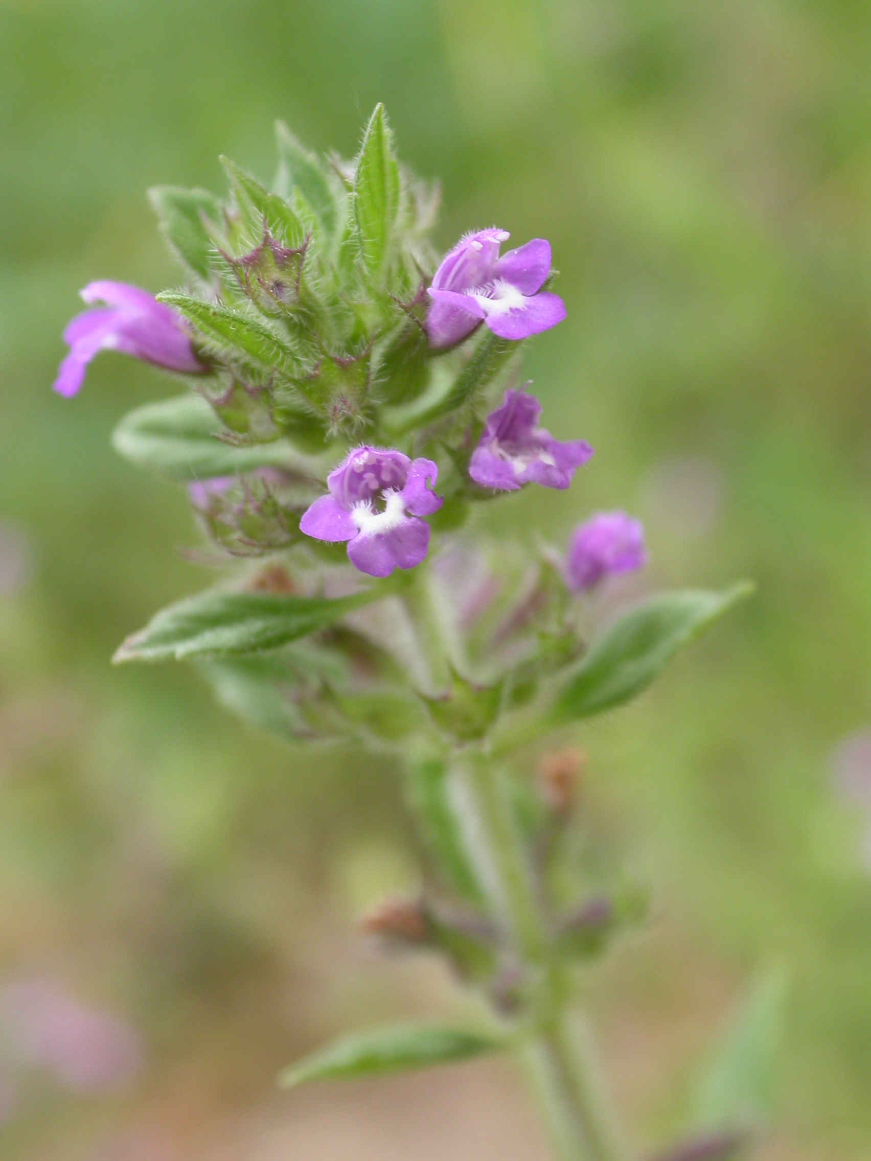 Acinos arvensis - Acinos des champs - Pelouse chézy-sur-Marne (Aisne) le 29/05/2005